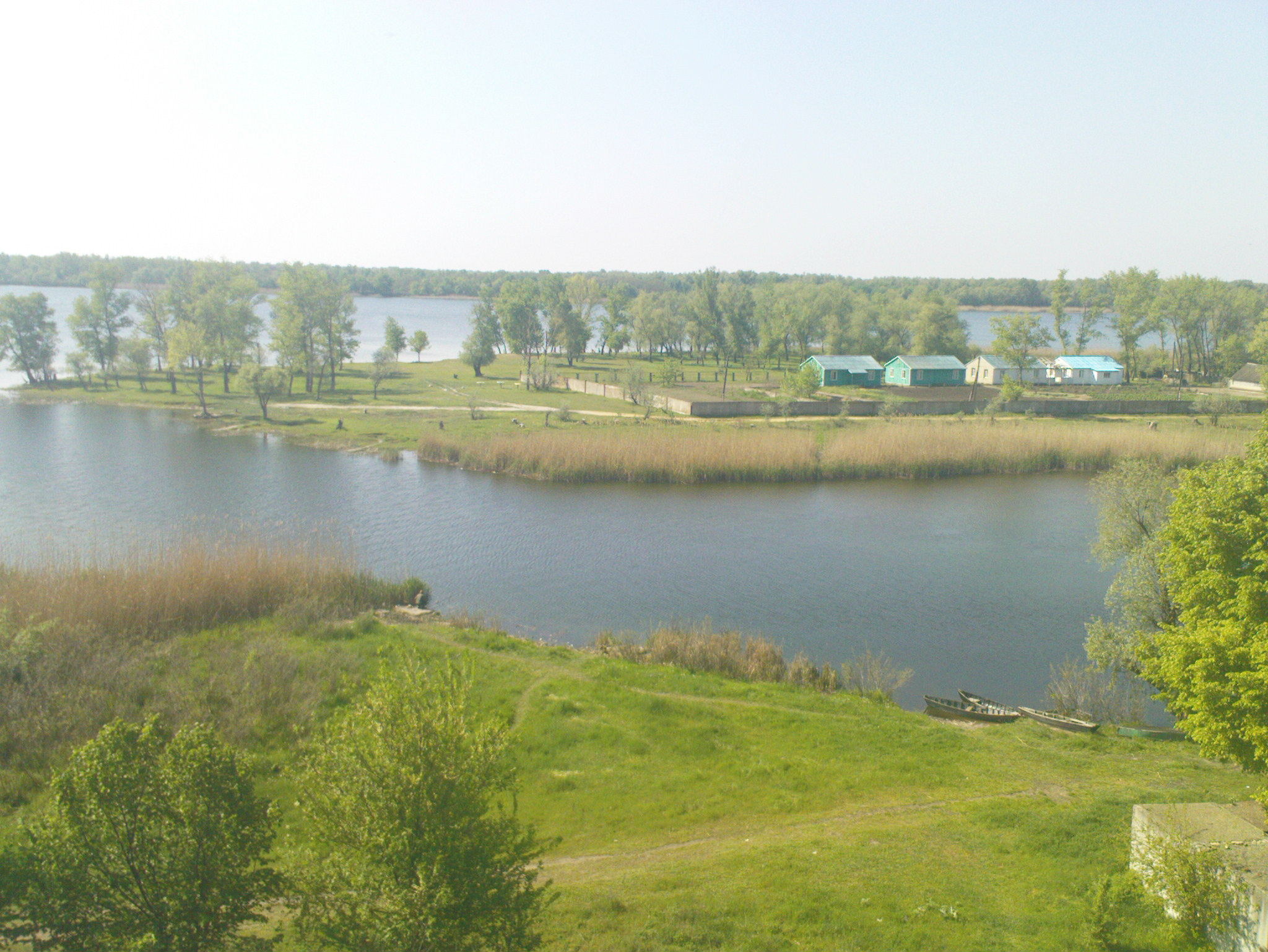 Остров весной